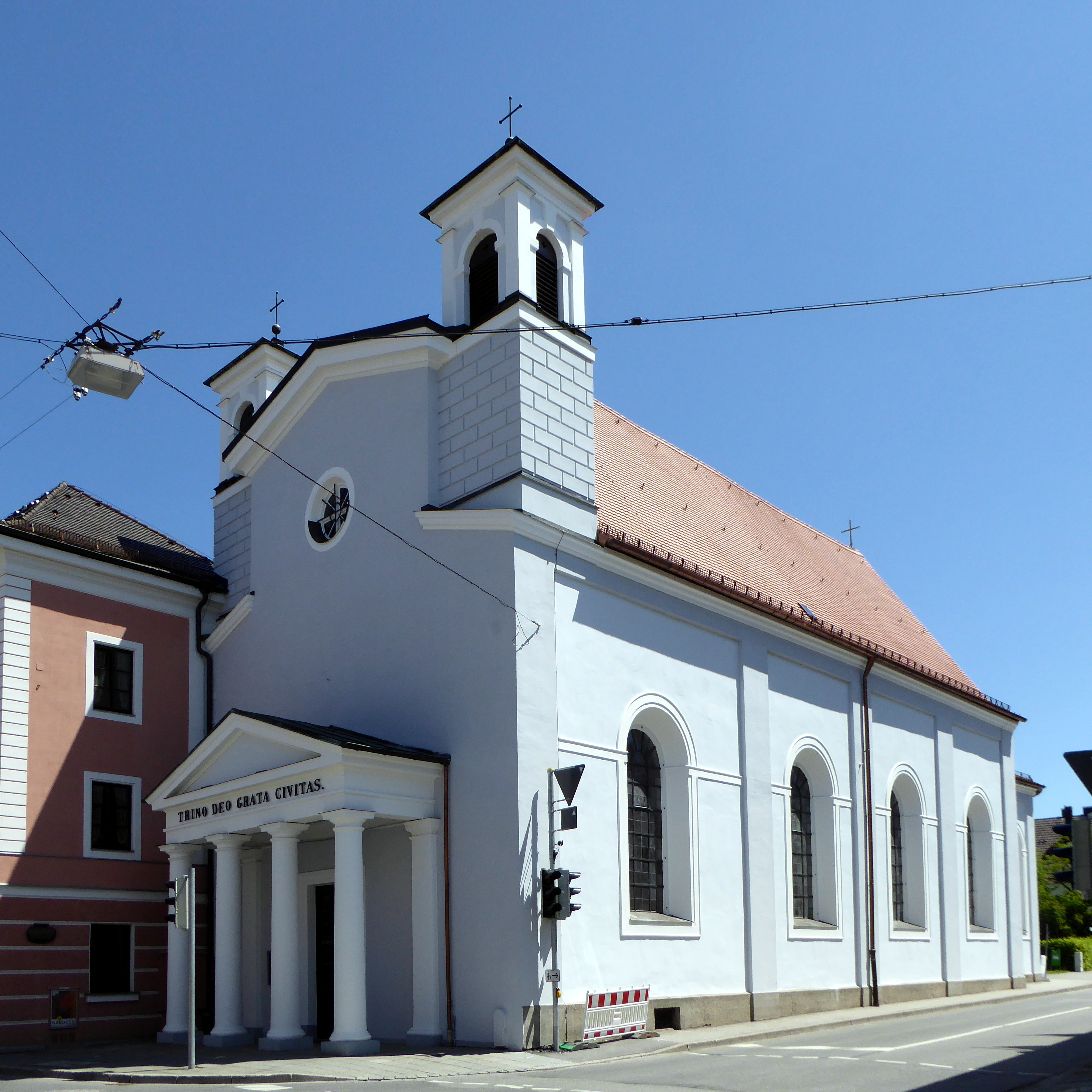 Katholische Spitalkirche zur Heiligen Dreifaltigkeit in Weilheim (Oberbayern).